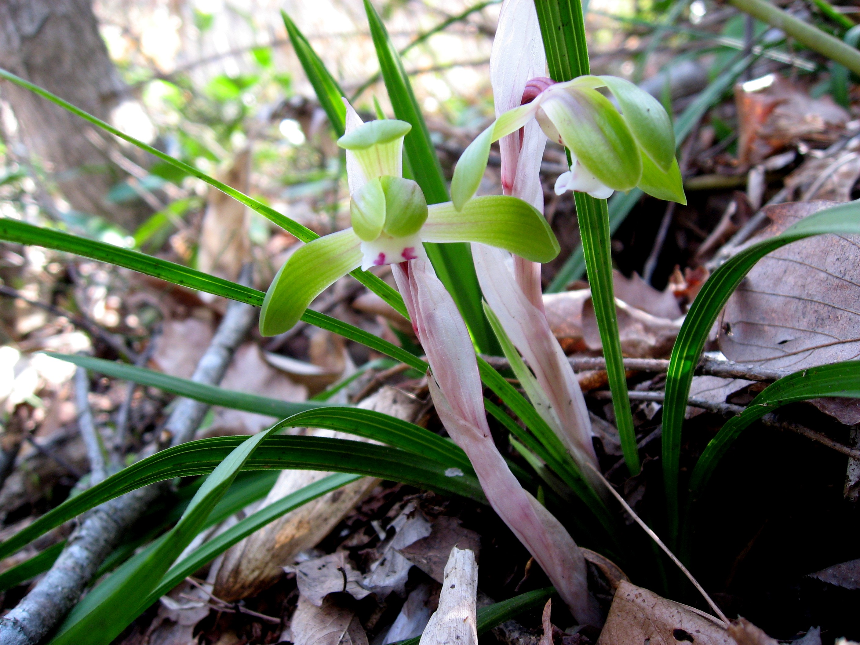 シュンラン Cymbidium goeringii